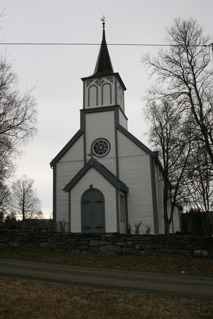 Berkåk kyrkje en: Berkåk church